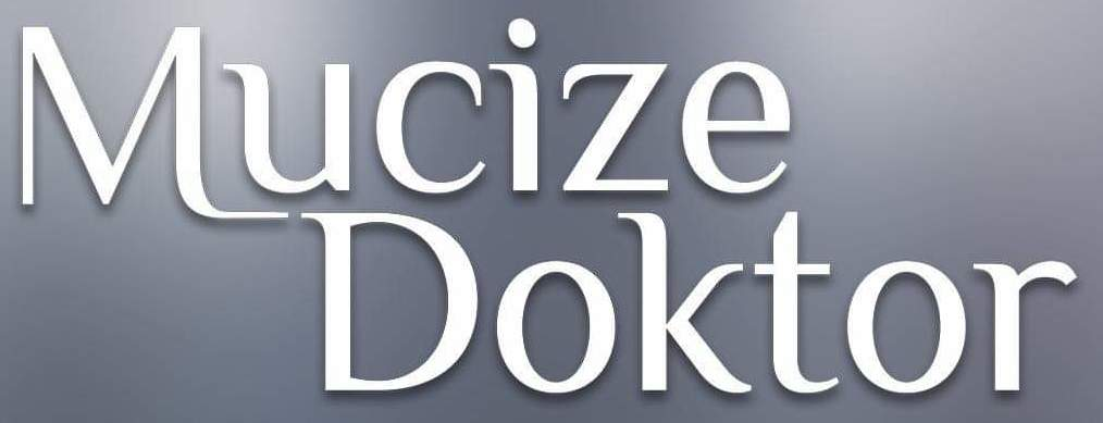 Mucize Doktor adlı dizinin logosu